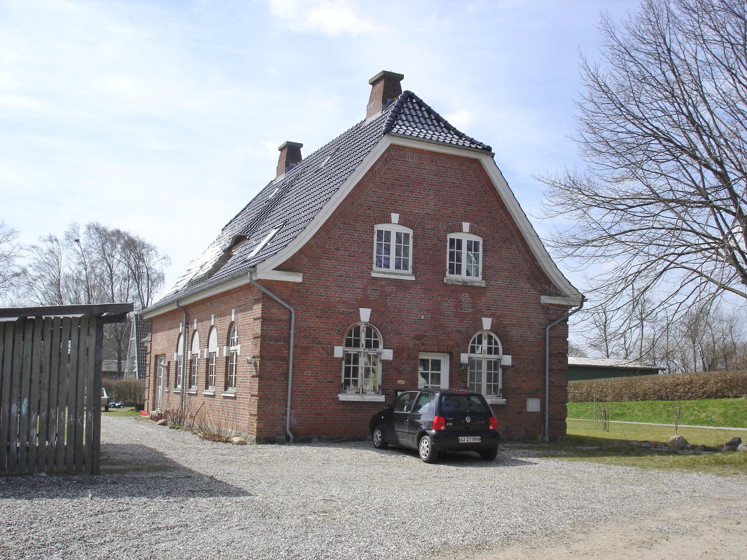 Taps Station fra vejsiden